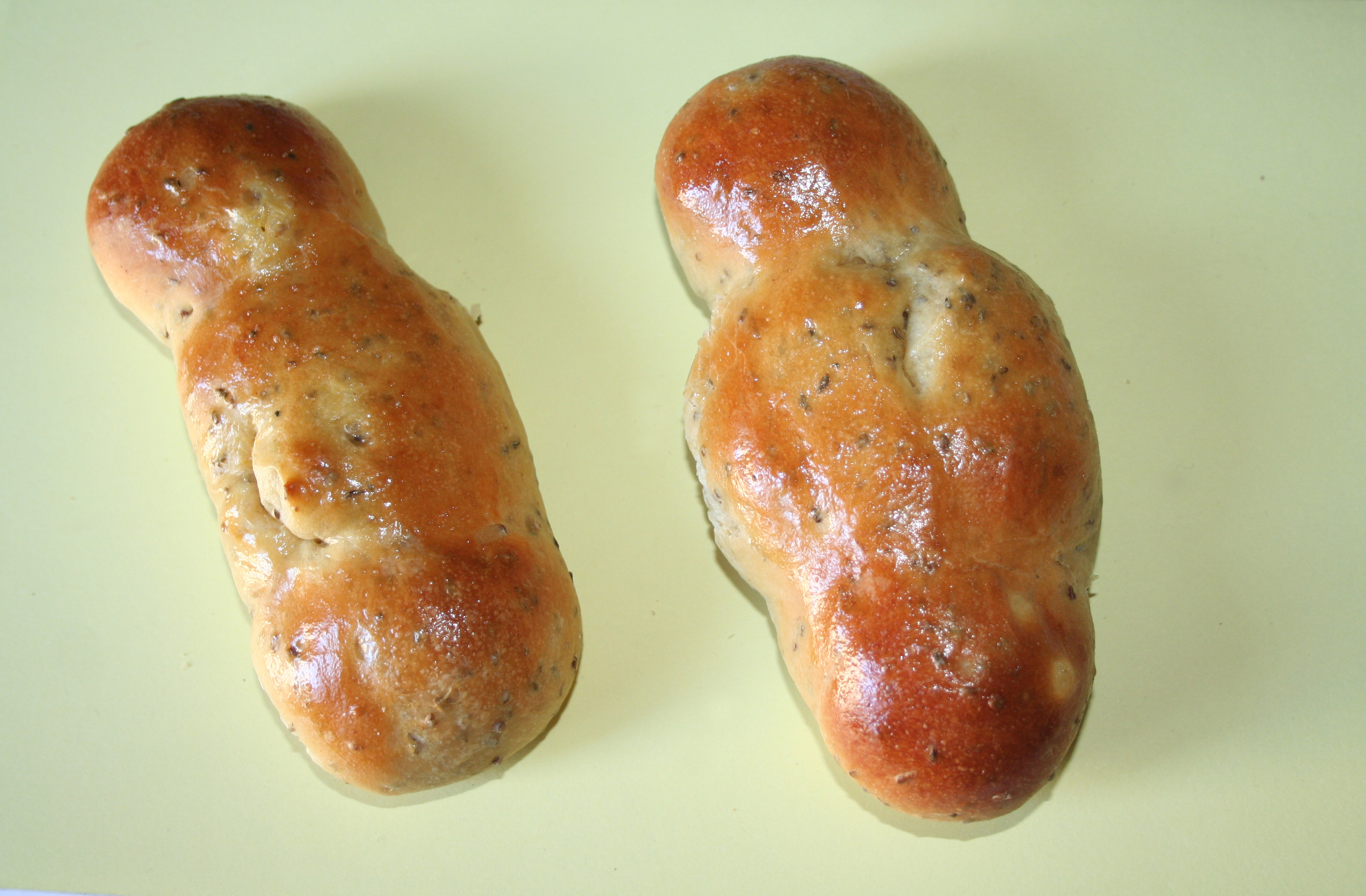 Frontignan (Hérault) - miquettes.